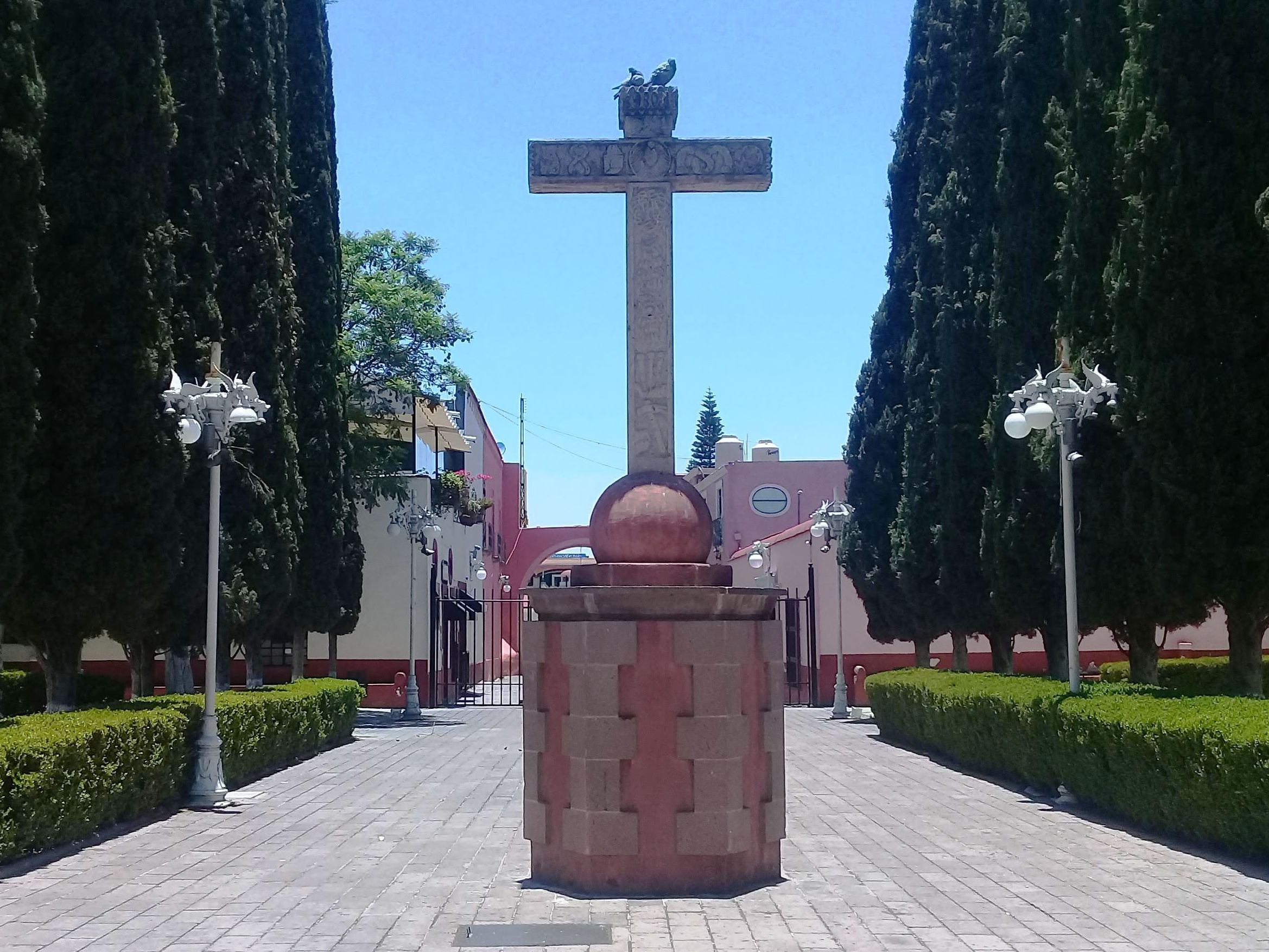 Templo y exconvento de San Nicolás de Tolentino (Actopan).